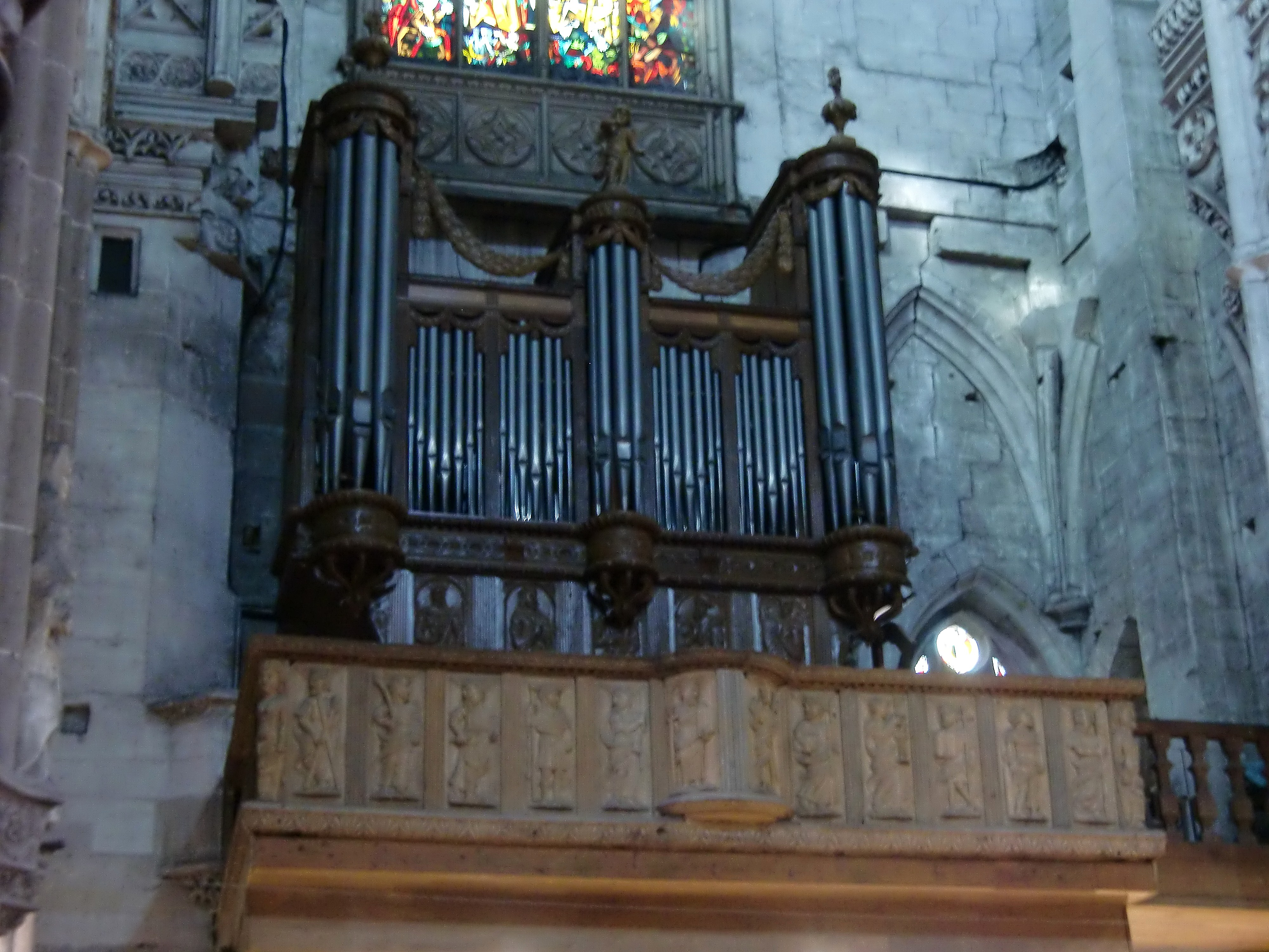 Grand orgue de l'église Saint-Ouen à Pont-Audemer (Eure, France). Tribune et base du buffet Renaissance (16e siècle) supportant un buffet du 18e siècle de style Louis XVI. La base comprend le soubassement orné de 5 panneaux historiés sculptés en haut-relief, les 3 consoles et la frise. L'ensemble est classé Monument Historique au titre objet depuis le 10-12-1971.